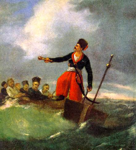 Гамалія. Полотно, олія (30 × 28). [1842]. ДМШ, інв. № ж — 97. За твердженням колишнього власника В. Б. Антоновича, цю картину, як свій твір, Шевченко нібито подарував художнику Ф. Ткаченку, який в свою чергу подарував її Антоновичу. З такими даними картина вперше була експонована у 1899 р. на виставці старовинних художніх речей та картин у Києві (див. «Археологическая летопись Южной России», 1899, стор. 34). З цього часу вона традиційно увійшла в літературу як твір Шевченка. Порушення історичної відповідності в костюмах персонажів картини, що не властиво творам Шевченка, а також техніка письма, чужа олійним творам Шевченка, вимагають додаткової перевірки щодо авторства.